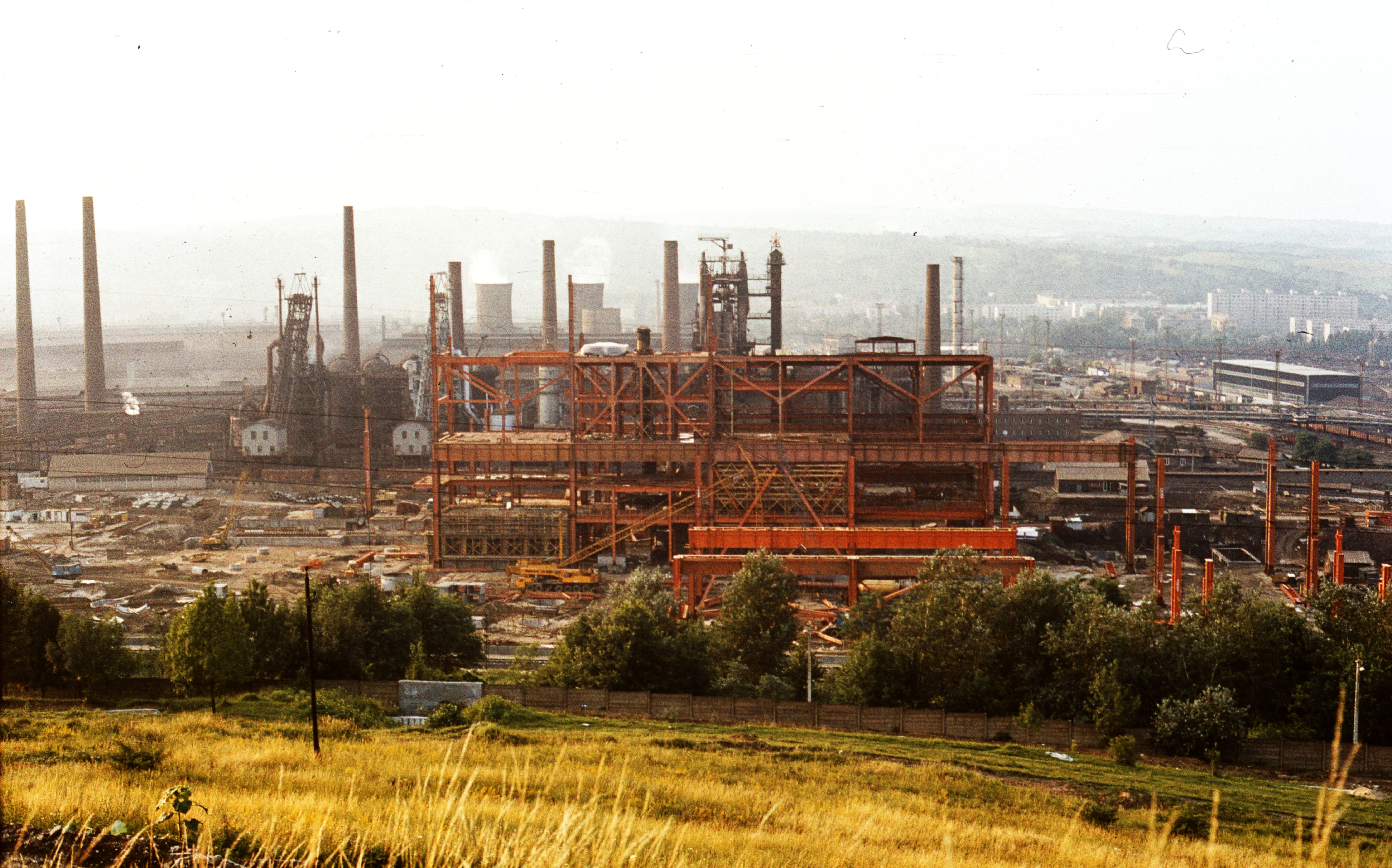 Lenin Kohászati Művek, előtérben az épülő kombinált acélmű. Location: Hungary, Diósgyőr Tags: colorful, factory, chimney Title: Lenin Kohászati Művek, előtérben az épülő kombinált acélmű.